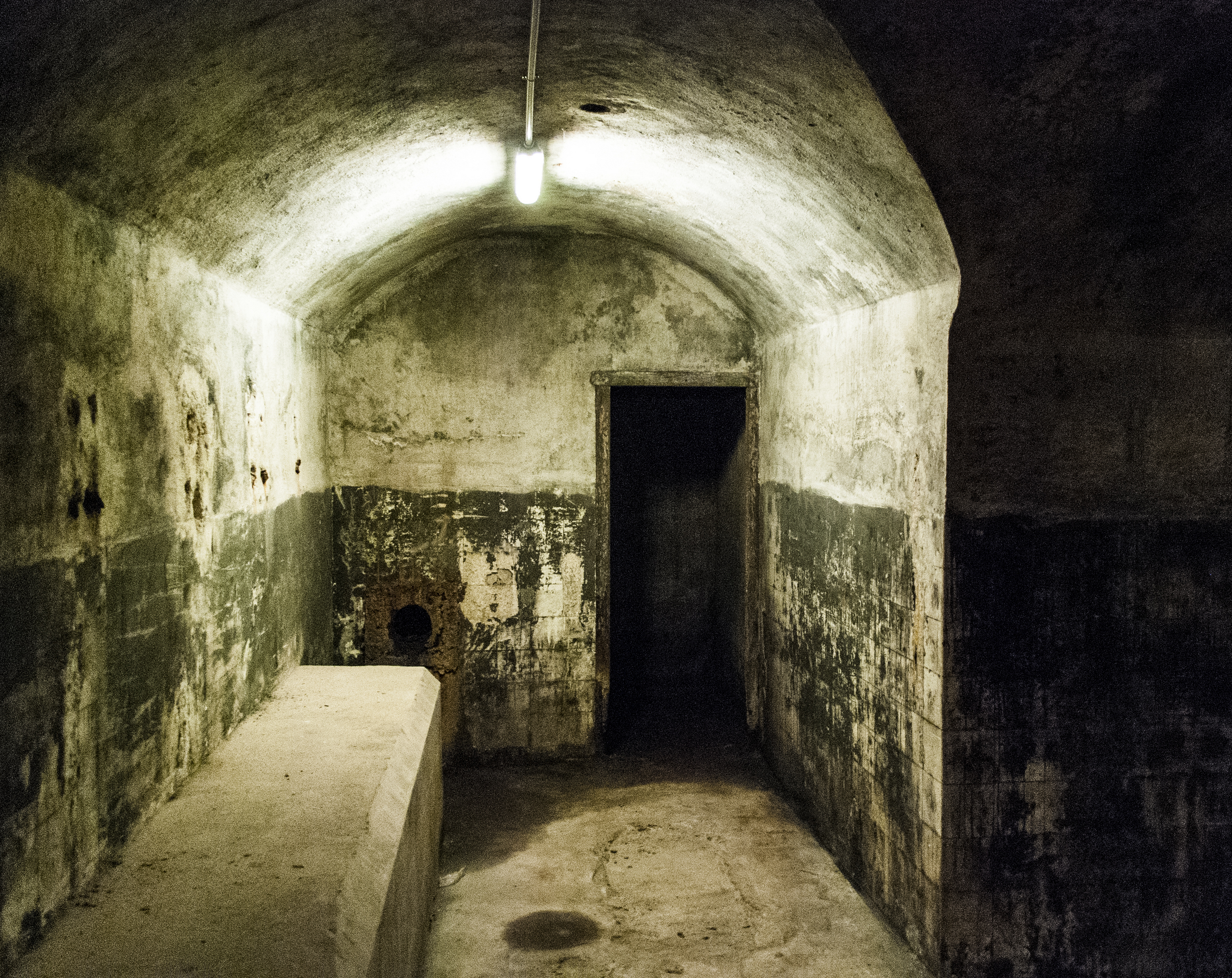 Hispania Nostra organizó, en colaboración con el Colegio de Ingenieros de Montes, una visita gratuita para sus socios al jardín histórico “El Capricho” de la Alameda de Osuna. El Jardín fue explicado de una manera magistral por Santiago Soria Carreras, vocal del Colegio de Ingenieros de Montes y Subdirector General de zonas verdes y arbolado urbano del Ayuntamiento de Madrid. El Sr. Soria dio a conocer a los visitantes tanto el aspecto botánico como innumerables anécdotas, datos históricos y leyendas que hicieron las delicias de los oyentes. Jardín Histórico El Capricho de la Alameda Osuna Crónica de la visita